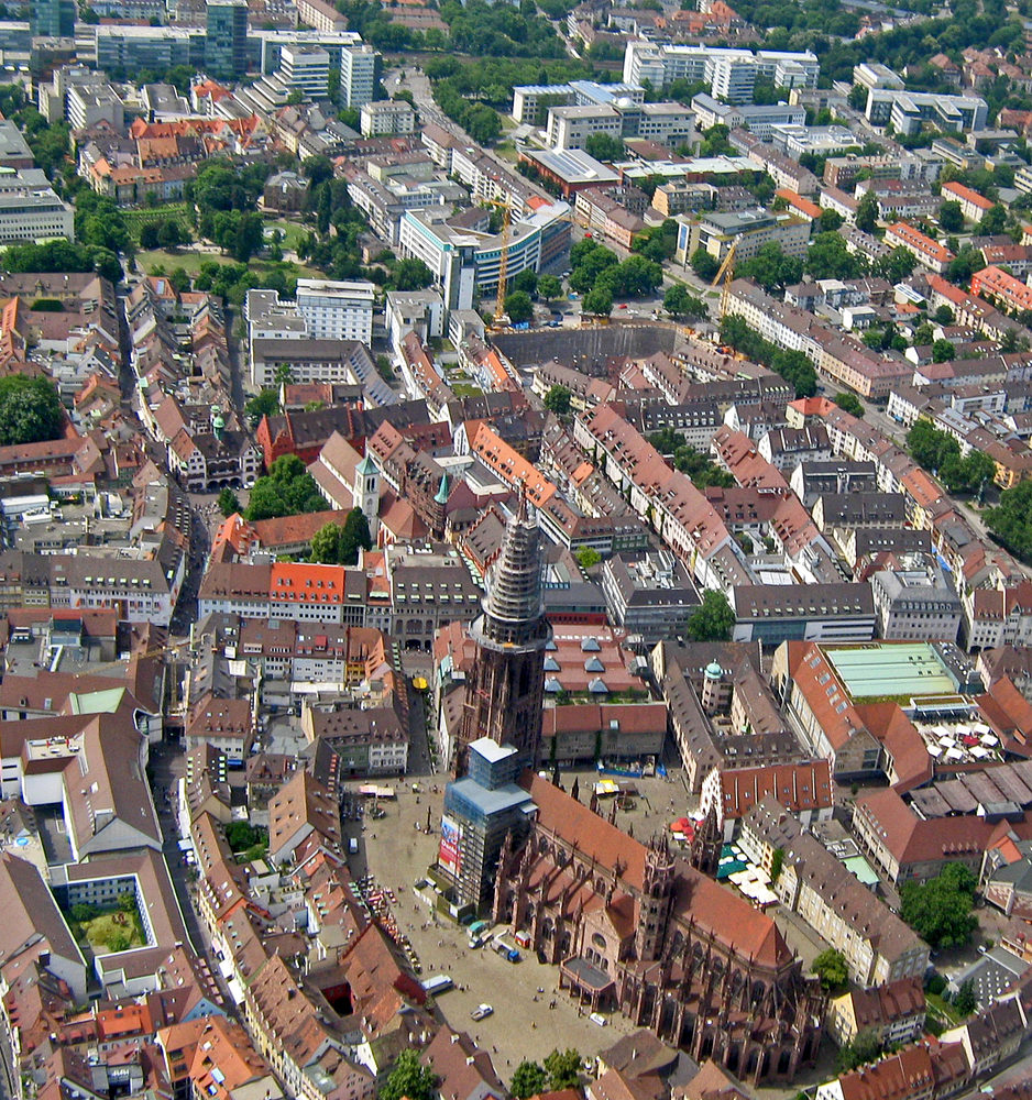 Freiburger Innenstadt mit Münster